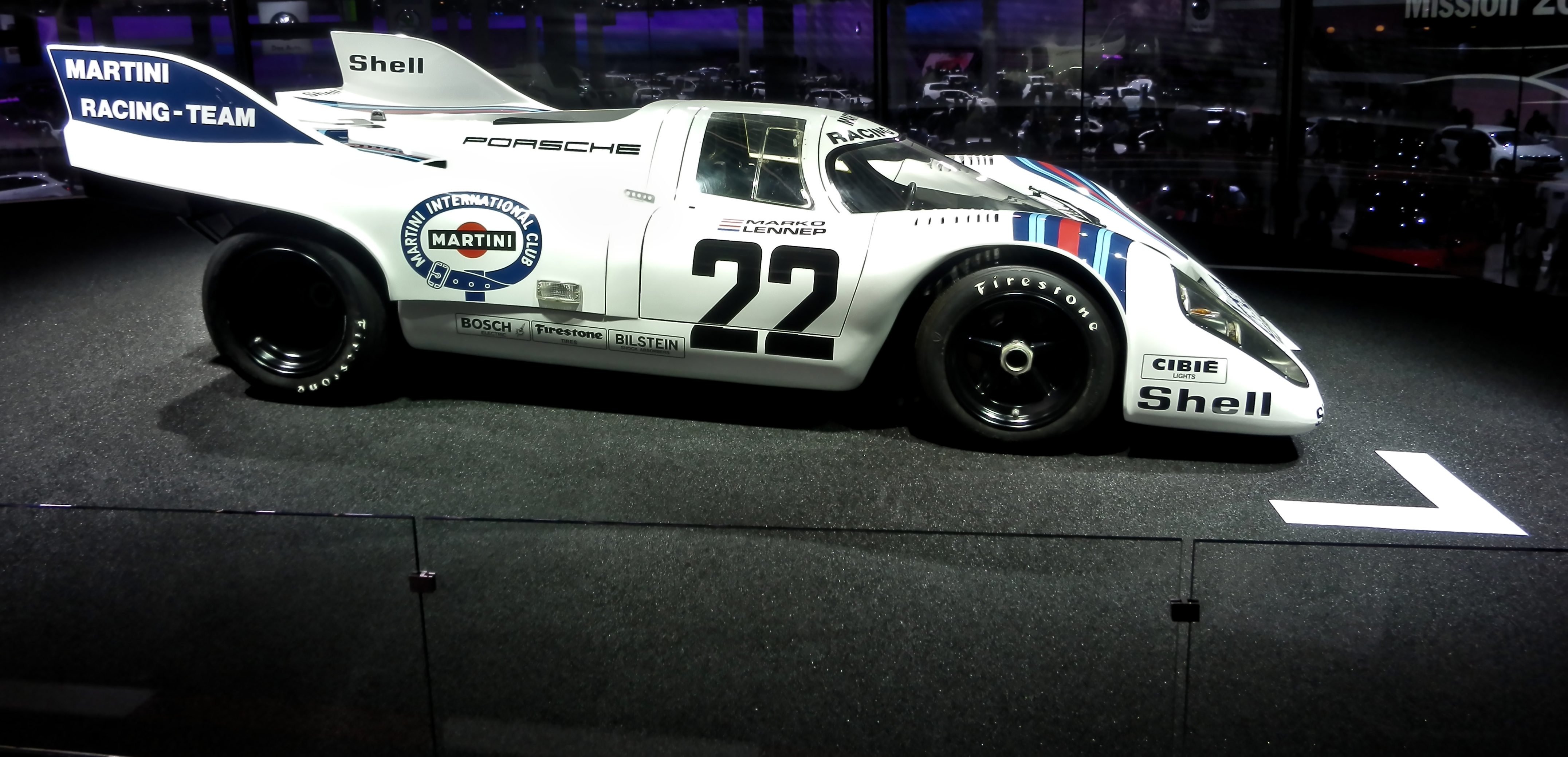 Porsche 917 at IAA 2013